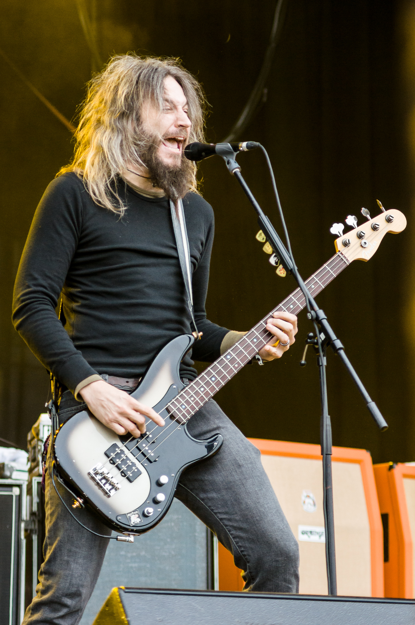 Toy Sanders - wokalista i basista zespołu Mastodon podczas koncertu na festiwalu Ursynalia 2012.